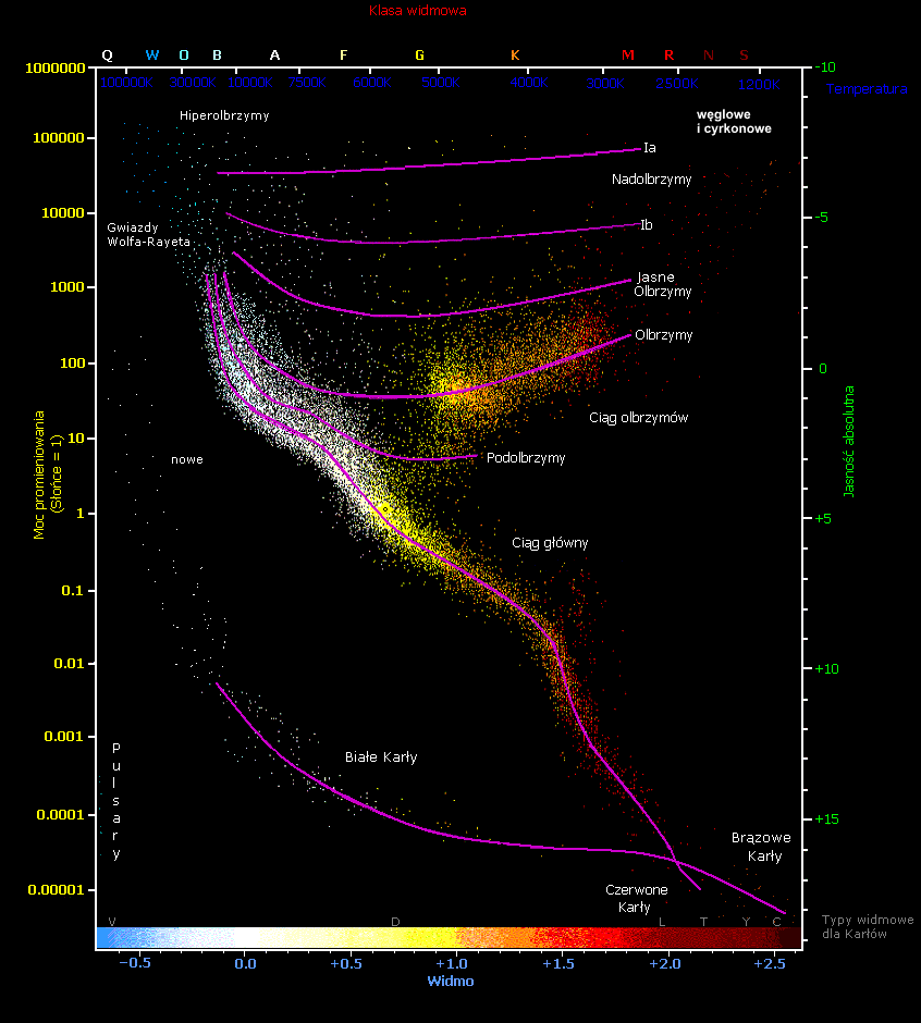 Diagram H-R z naniesionymi pozostałymi typami gwiazd